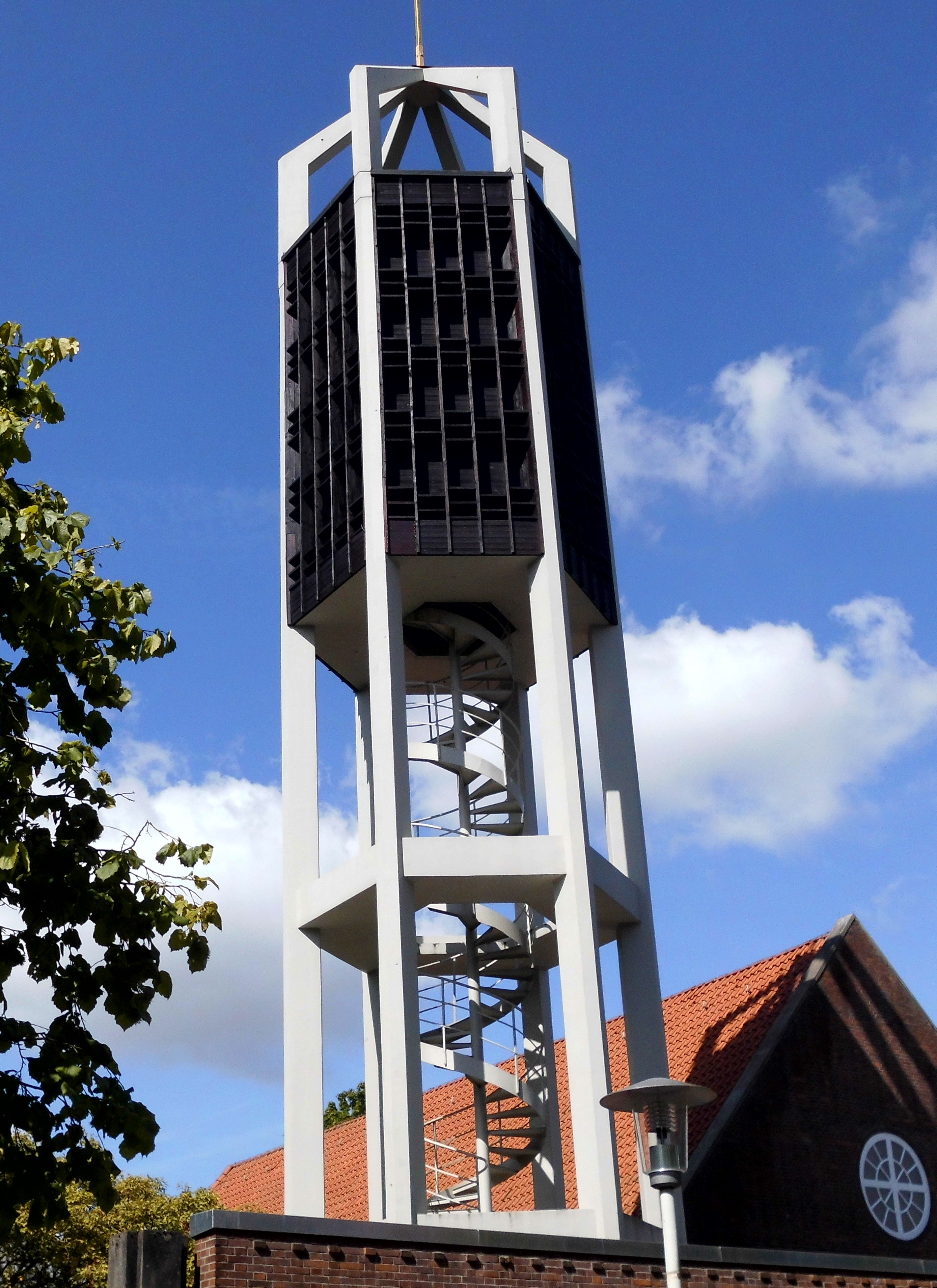 Turm der Vicelinkirche im Kieler Stadtteil Südfriedhof. Siehe auch Gesamtaufnahme